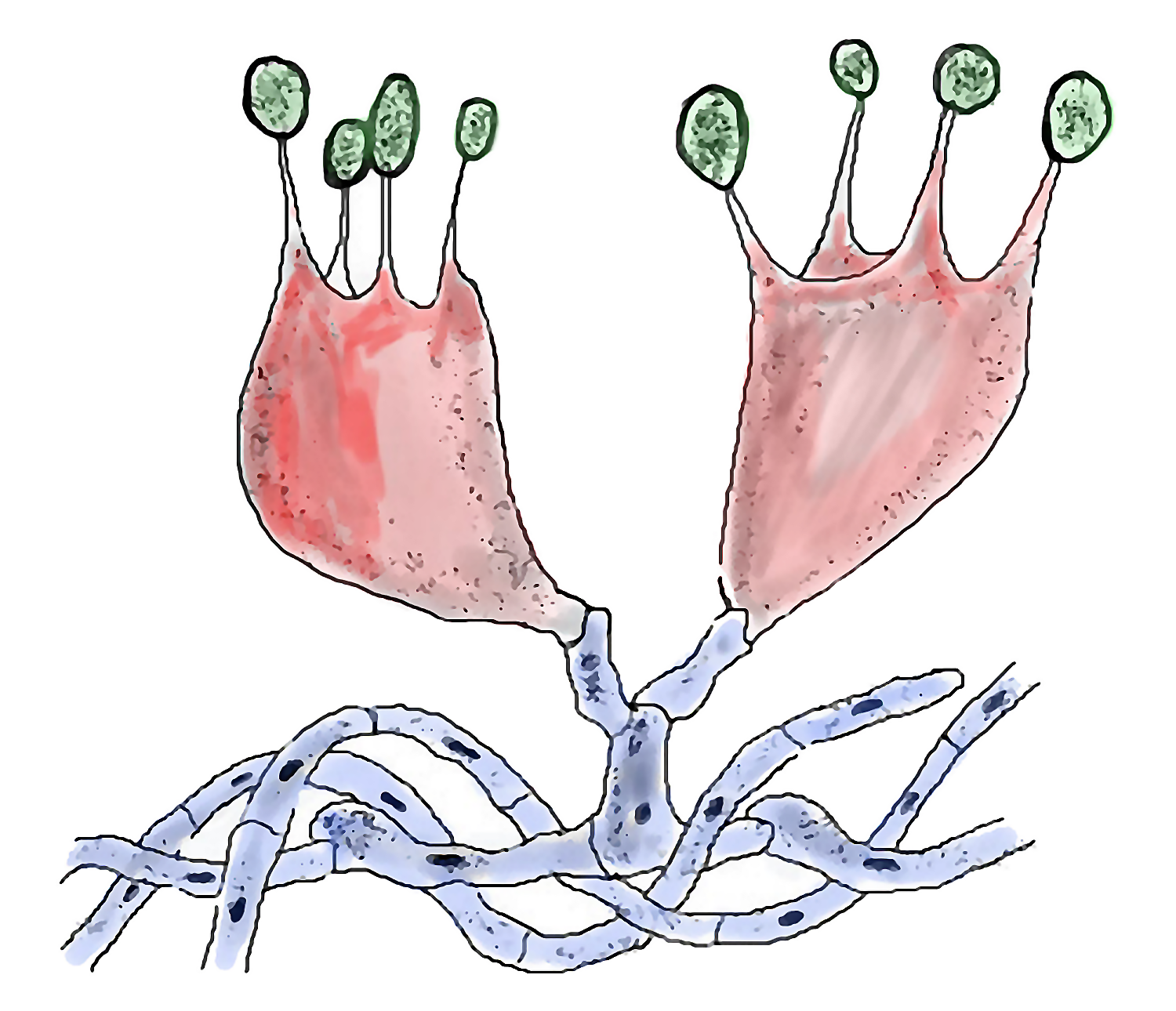 Zeichnung einer Basidie.